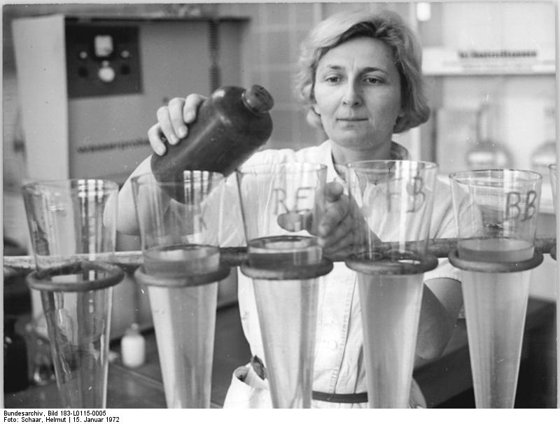 Leuna, Kontrolle von Wasserproben ADN-ZB Schaar Schm-15.1.1972-Bez.Halle:Leuna-Werk beachten Landeskulturgesetz-Im Wasser-Labor der zentralen Abwasserbehandlung der Leuna-Werke nimmt Laborantin Margot Henze eine Schlammgehaltsbestimmung vor.Die gereinigten Abwässer, die wieder in die Saale zuückfließen, entsprechen in der Qualität den wasserwirtschaftlichen Forderungen.Bis zu 600 Kubikmeter Wasser werden in der Anlage stündlich mechanisch, chemisch und biologisch gereinigt.(dazu bitte auch L0115-4 u.6N beachten)